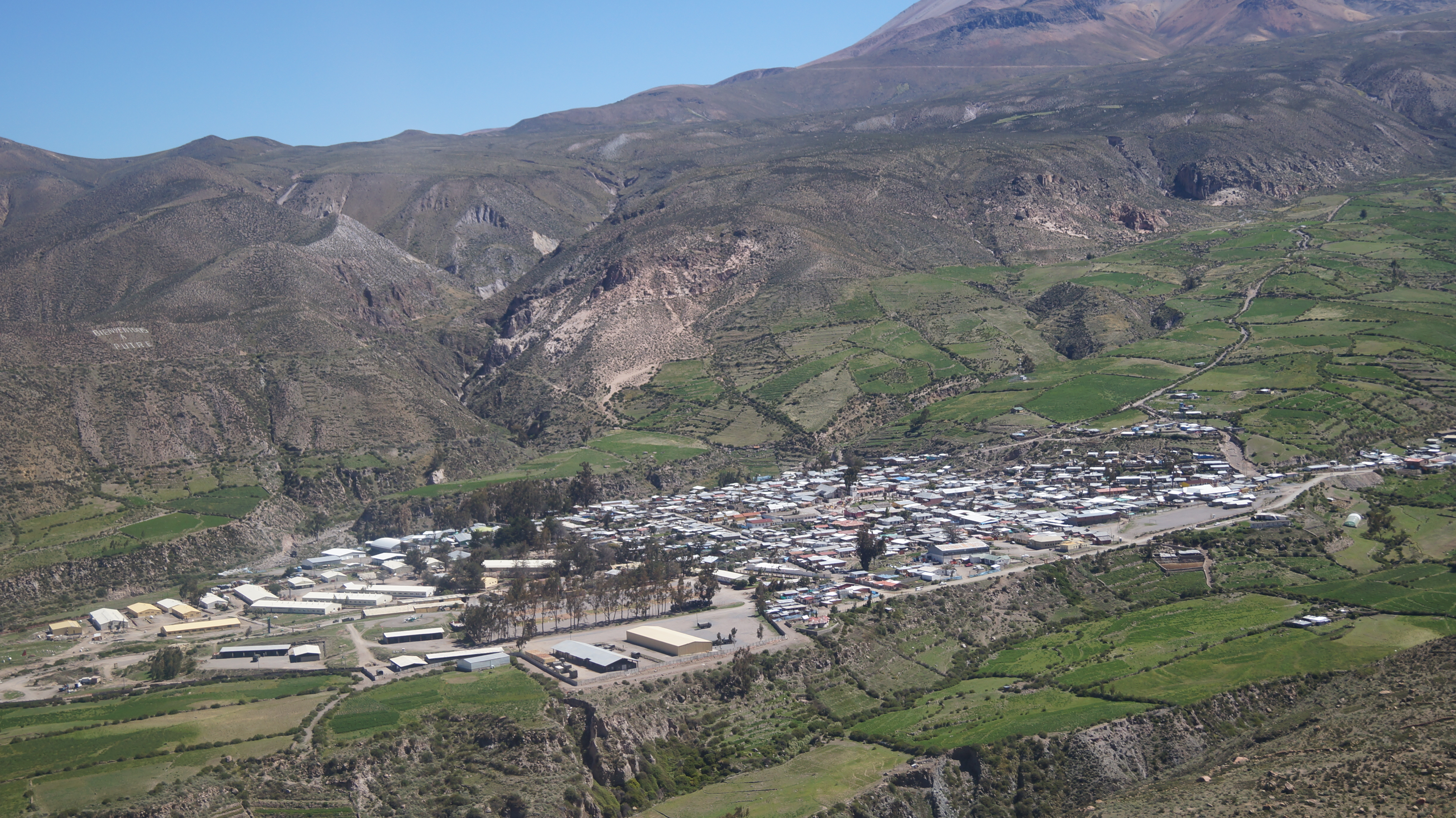 Putre